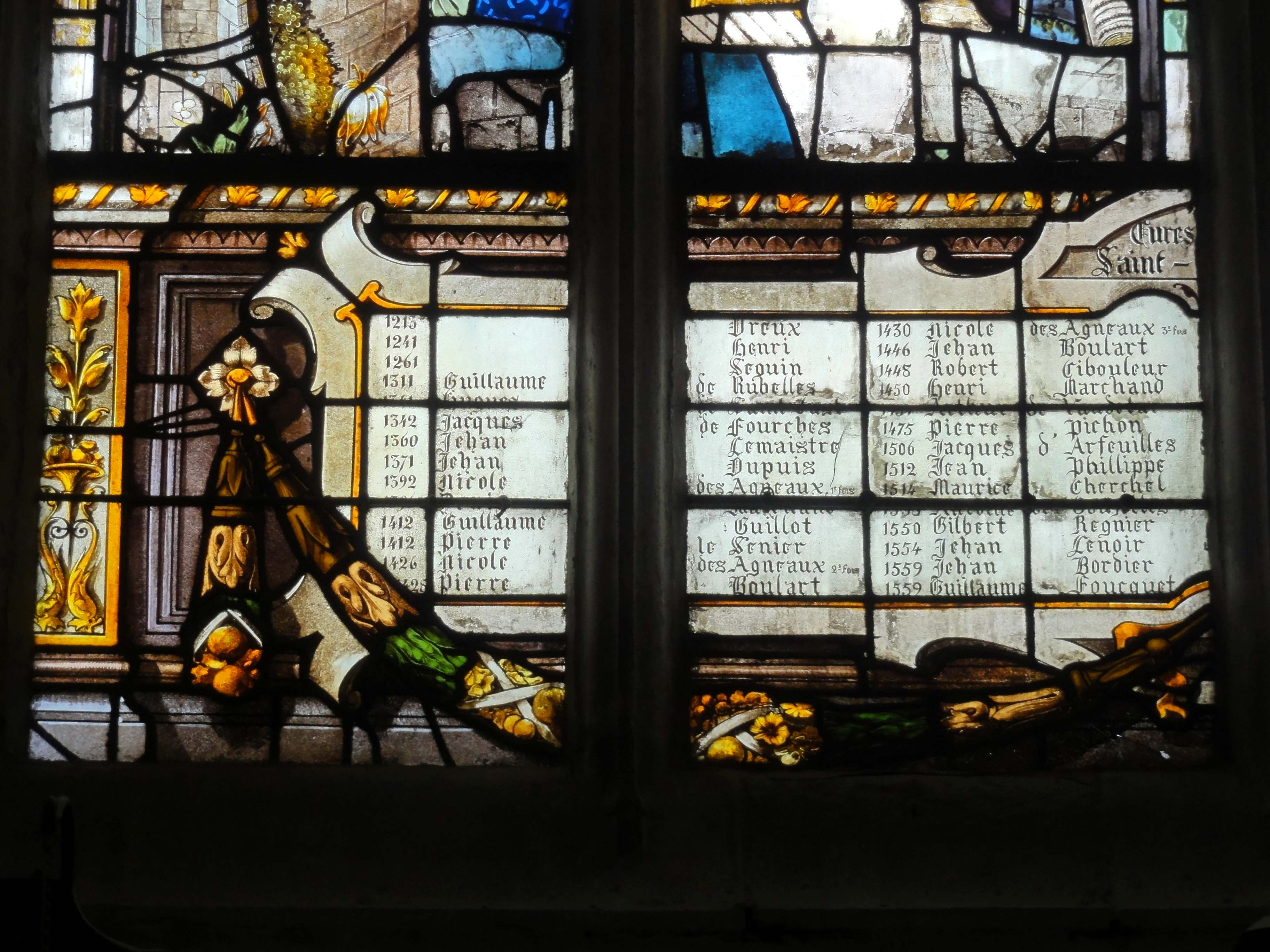 Vitrail de saint Loup de Sens ; ajout moderne : liste des curés.